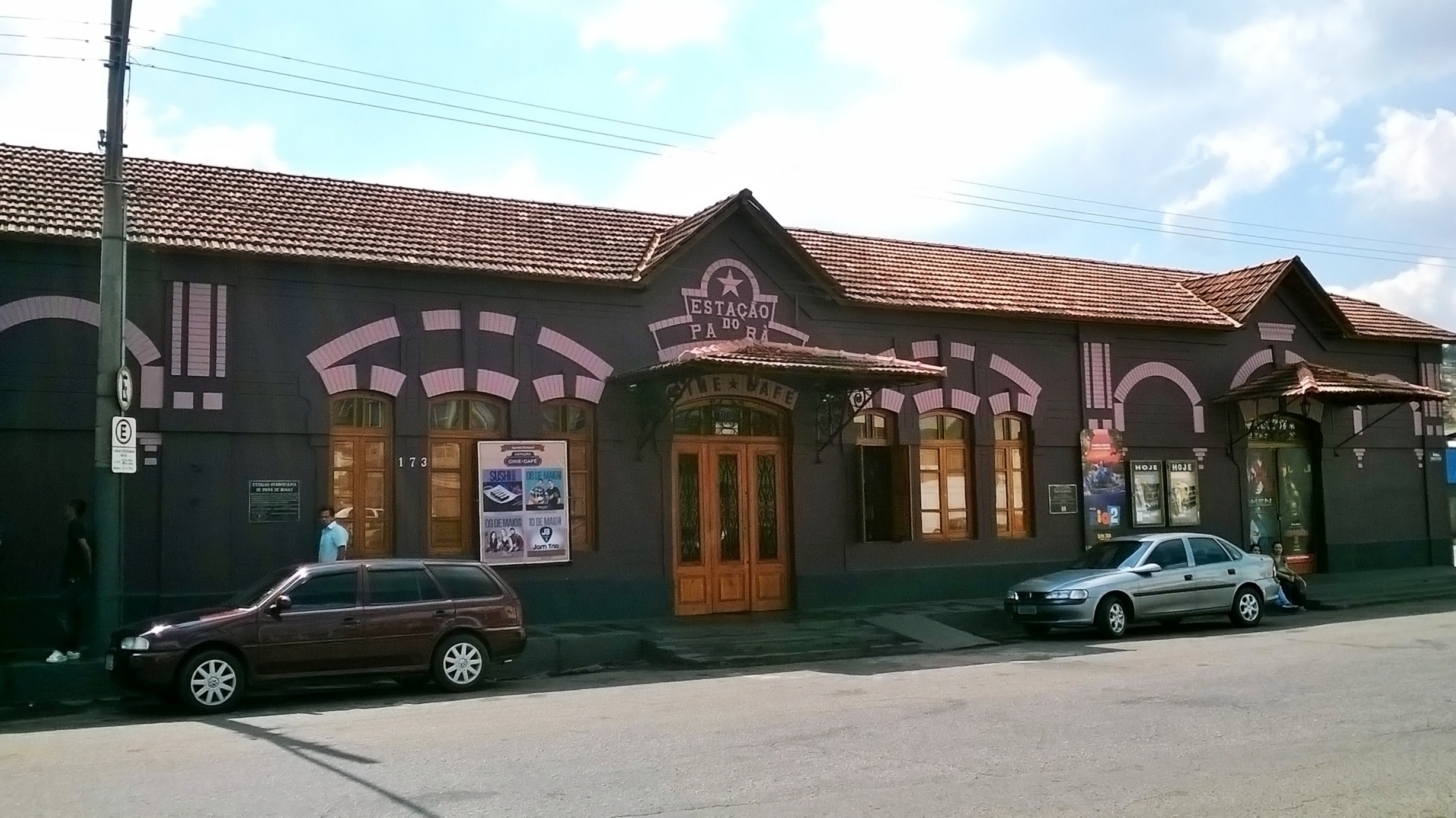 Cine-Café, localizado na cidade de Pará de Minas, Minas Gerais.